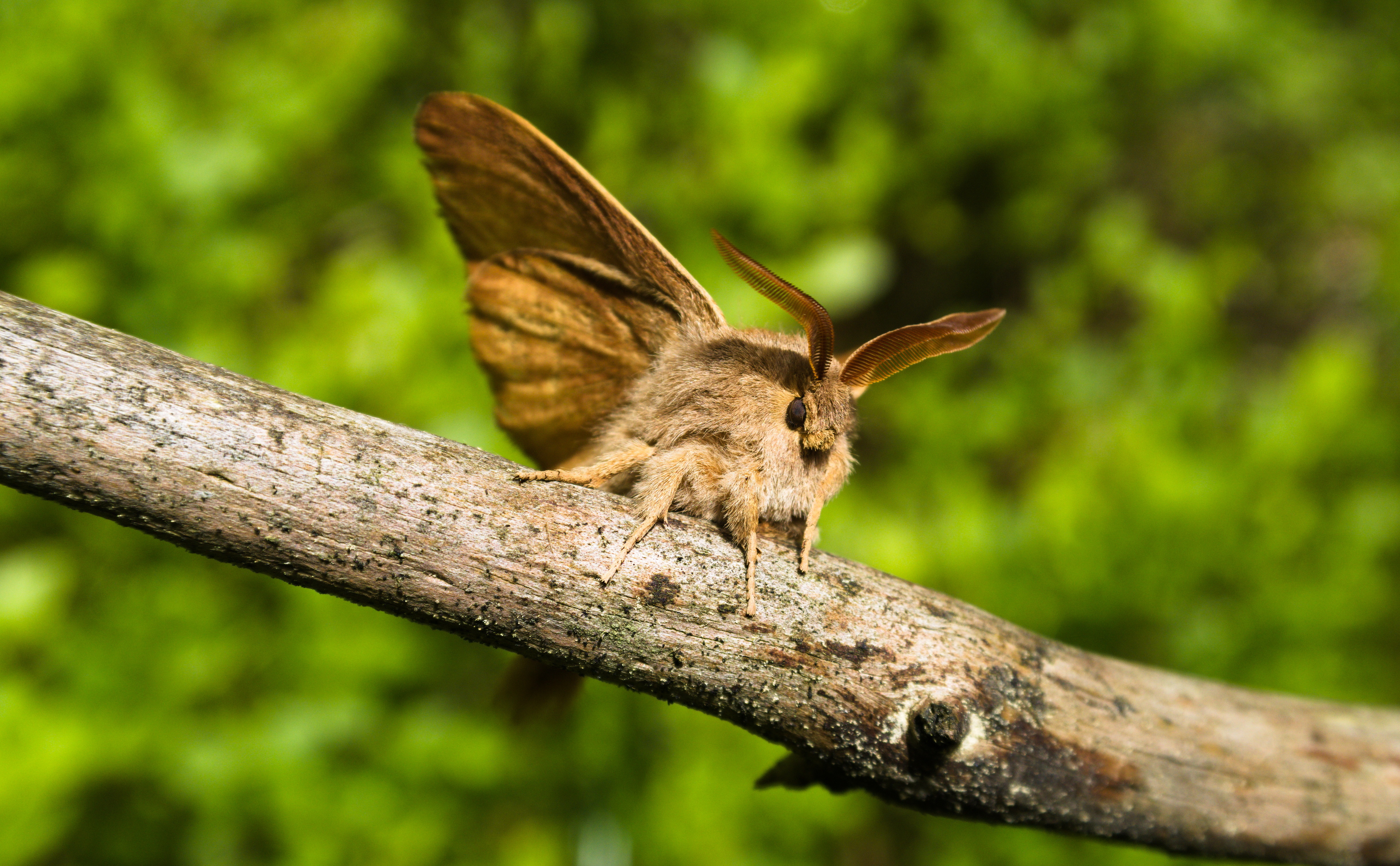 Männchen des Brombeerspinners (Macrothylacia rubi) am Naturdenkmal Böses Loch in der Dresdner Heide